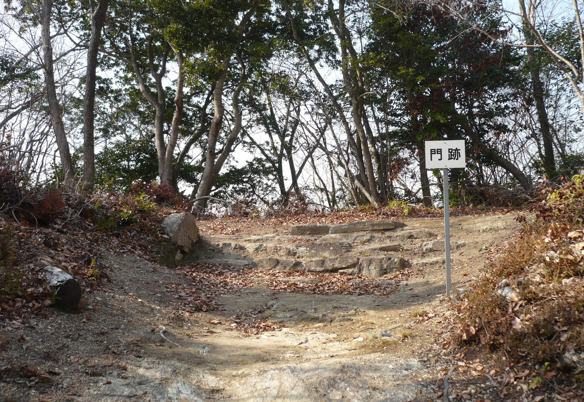 門跡